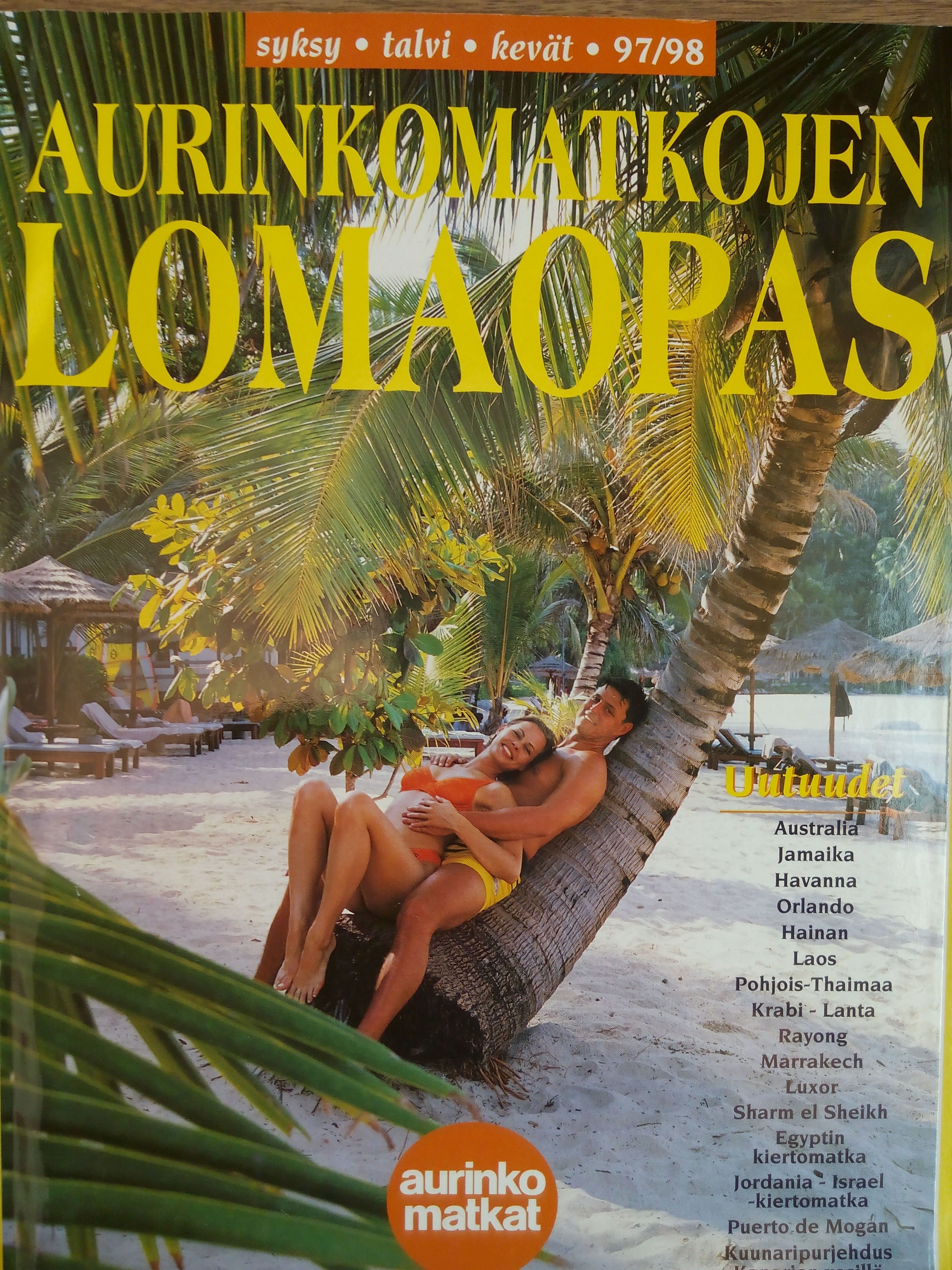 Matkaesite